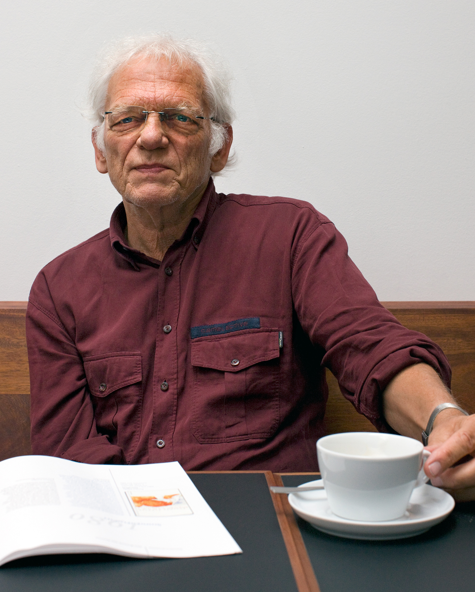 Erasmus Schöfer, Schriftsteller, im Literaturhaus Köln (15. Juni 2008)